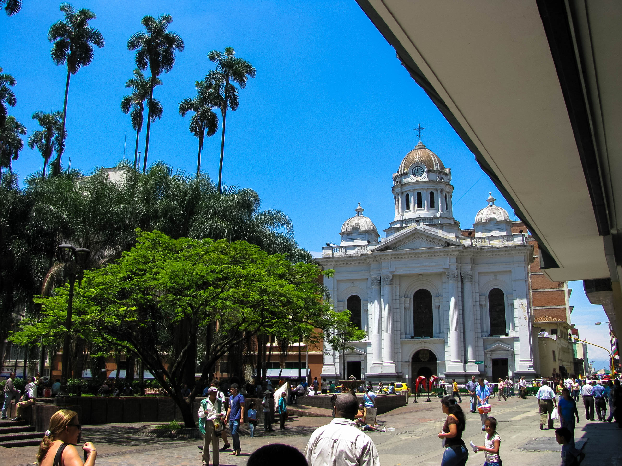 Edificio Otero